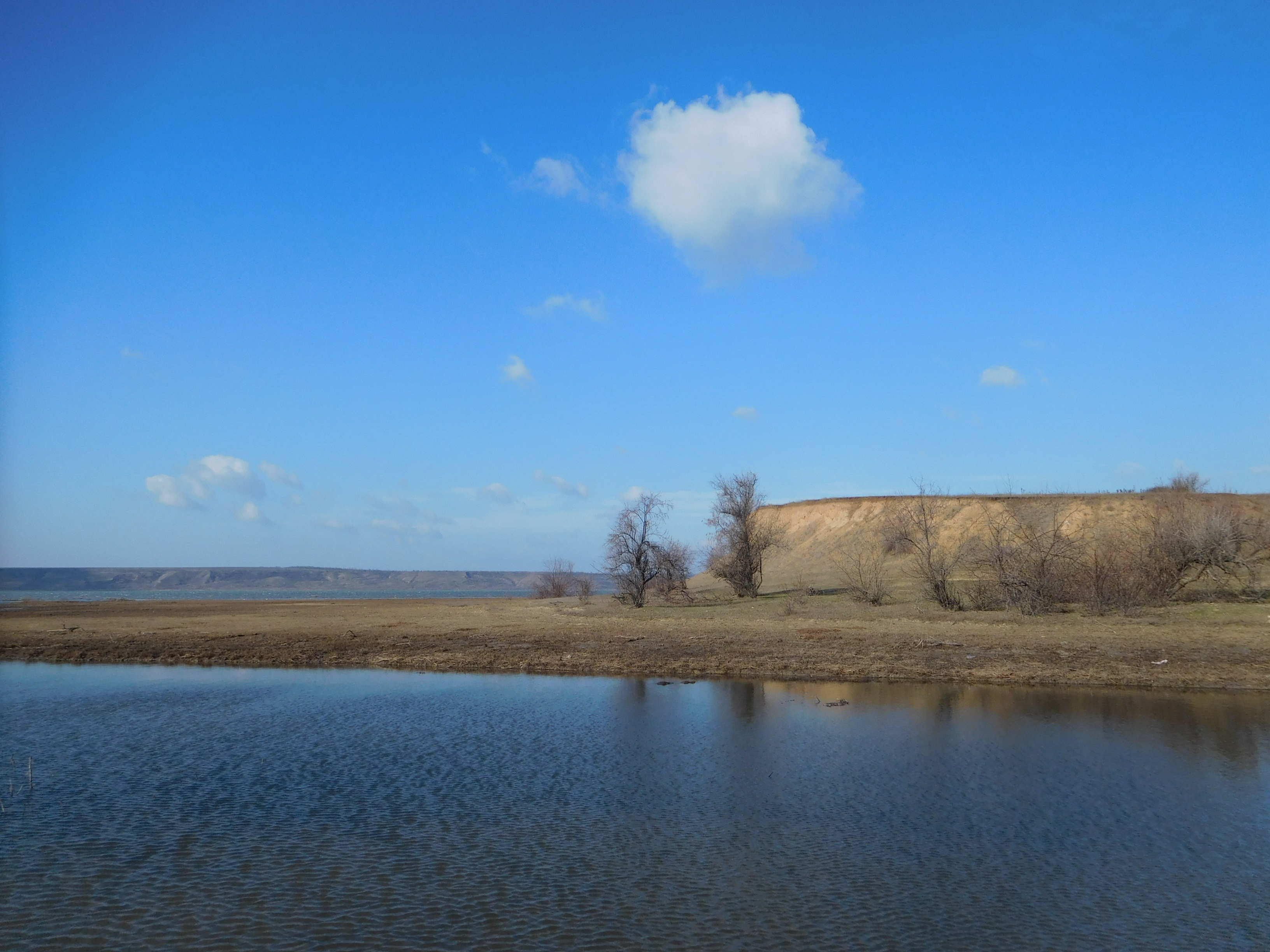 Річка Кубанка перед впадінням до Куяльницького лиману.